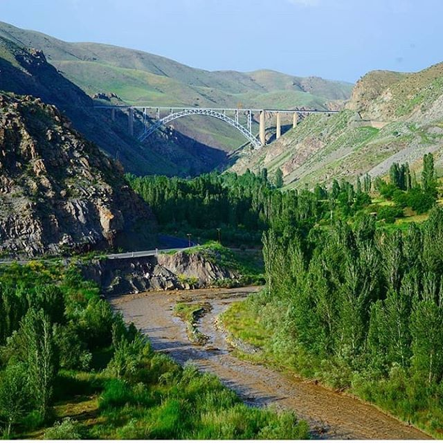 Qotur çayı və Qotur körpüsü